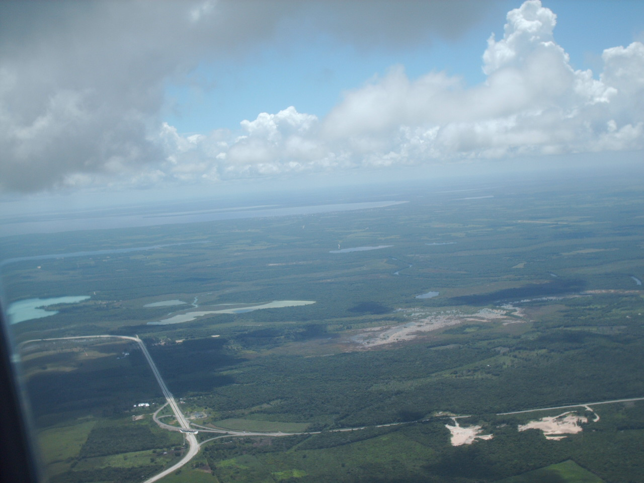 Fotografía aérea del entronque de las carretera 307 y 186 de México, en las cercanías de Chetumal y Bacalar, Quintana Roo.